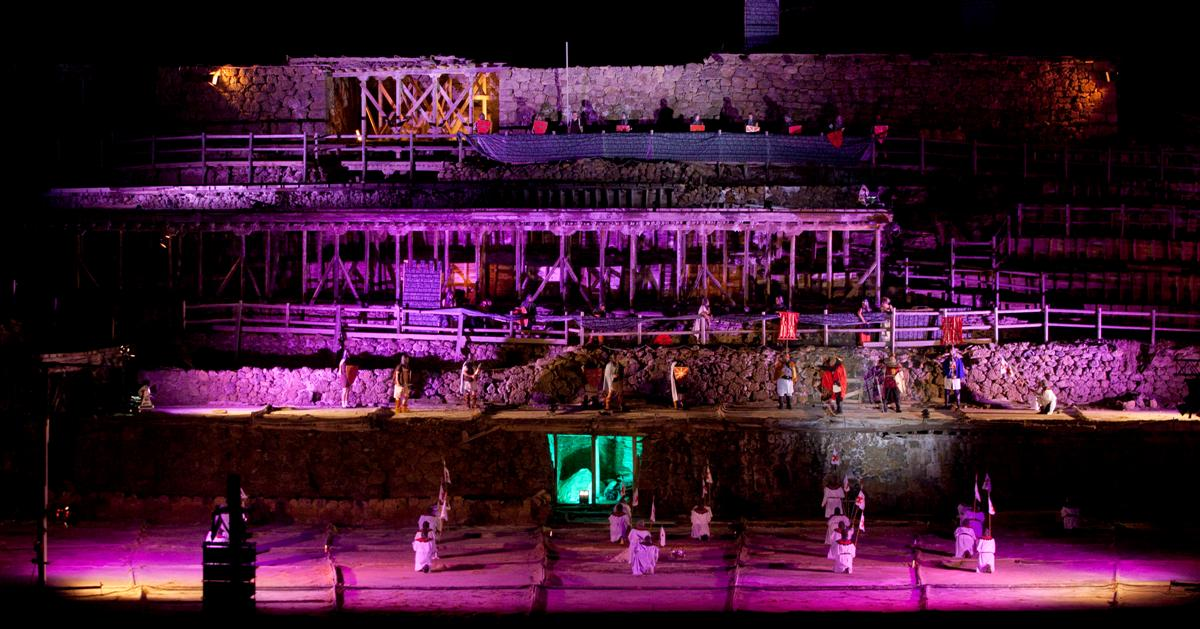 Espectáculo de luz y sonido celebrado en el Valle Salado de Añana,País Vasco, España